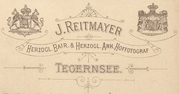 Reklameseite (Rückseite einer Fotografie) des Ateliers Josef Reitmayer München und Tegernsee, Herzoglich Bayerischer und Herzoglich Anhaltischer Hoffotograf, 1870